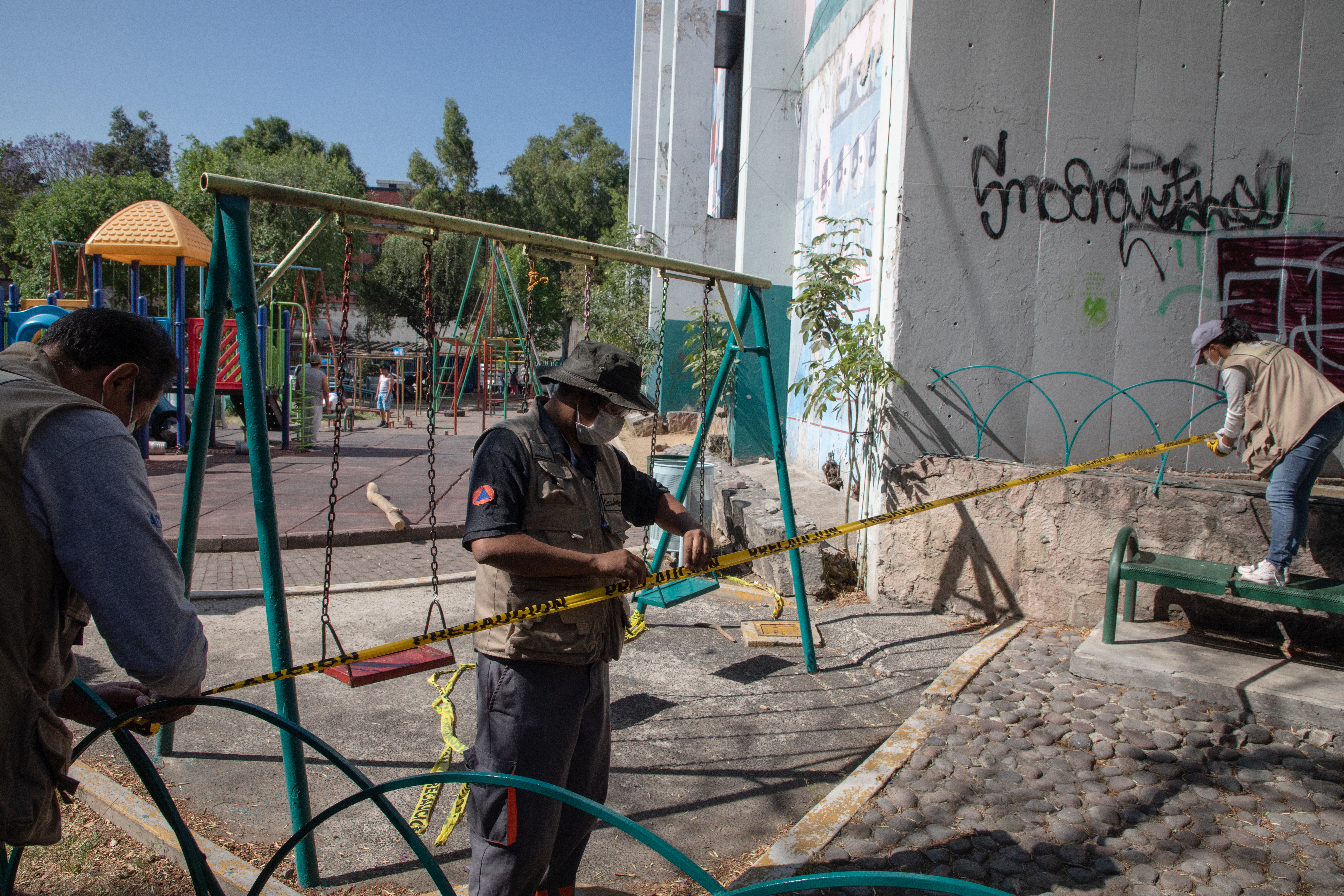 Cierre de los espacios públicos en Tlatelolco, Ciudad de México.